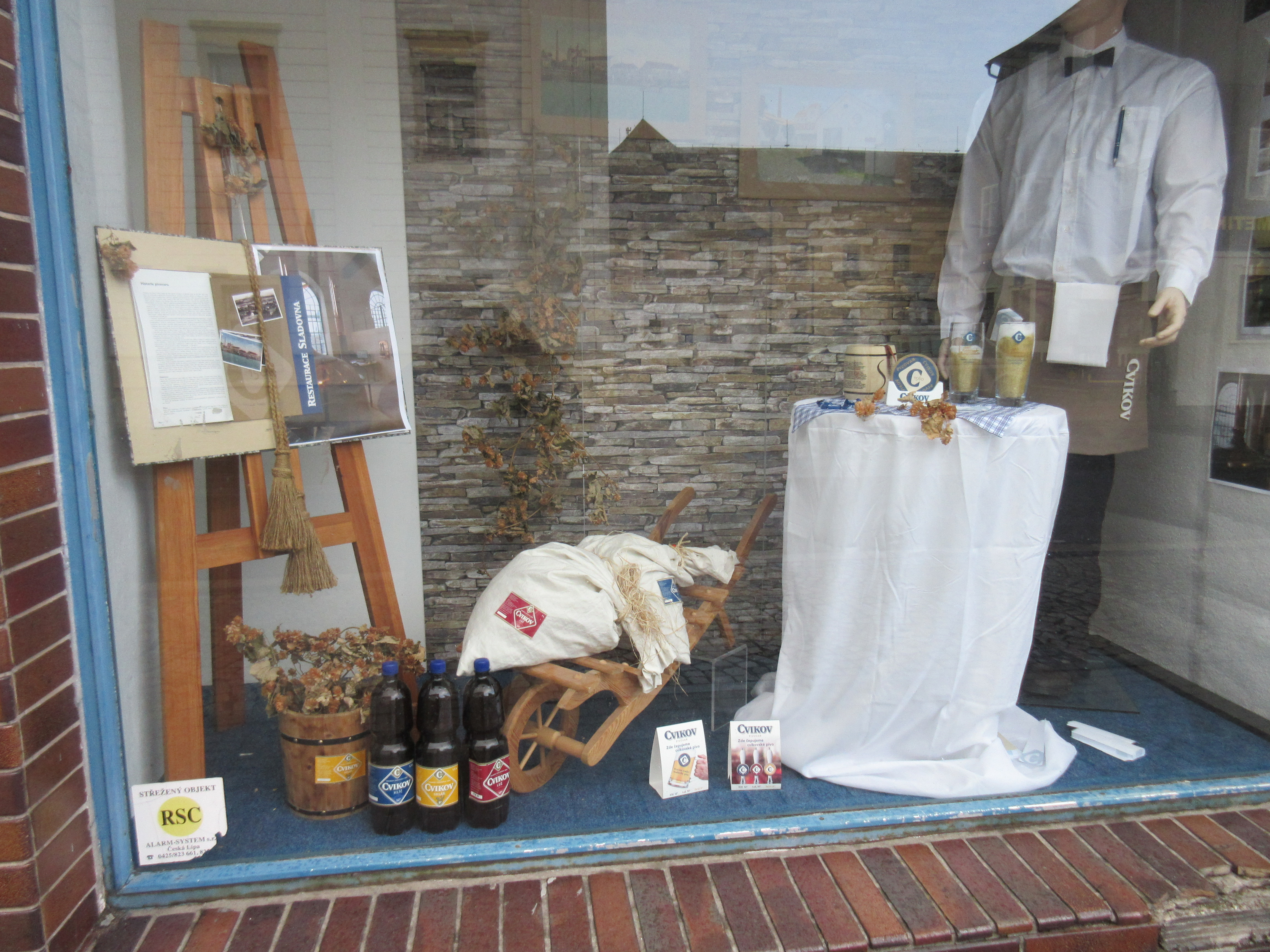 Výloha obchodu v Liberecké 66, Nový Bor byla upravena jako reklama na nově otevřený Cvikovský puvovar